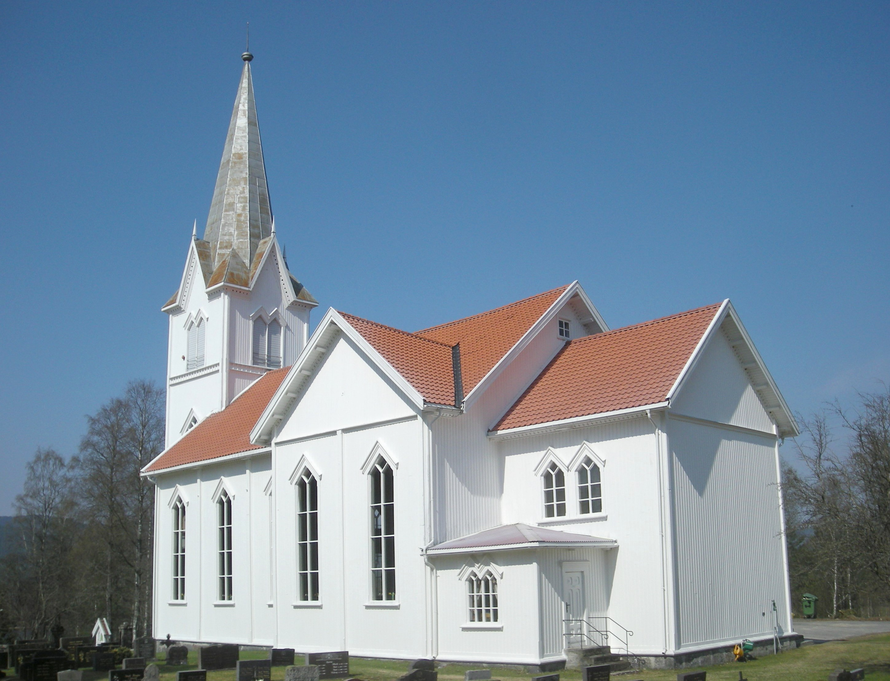 Evje kirke i 2011